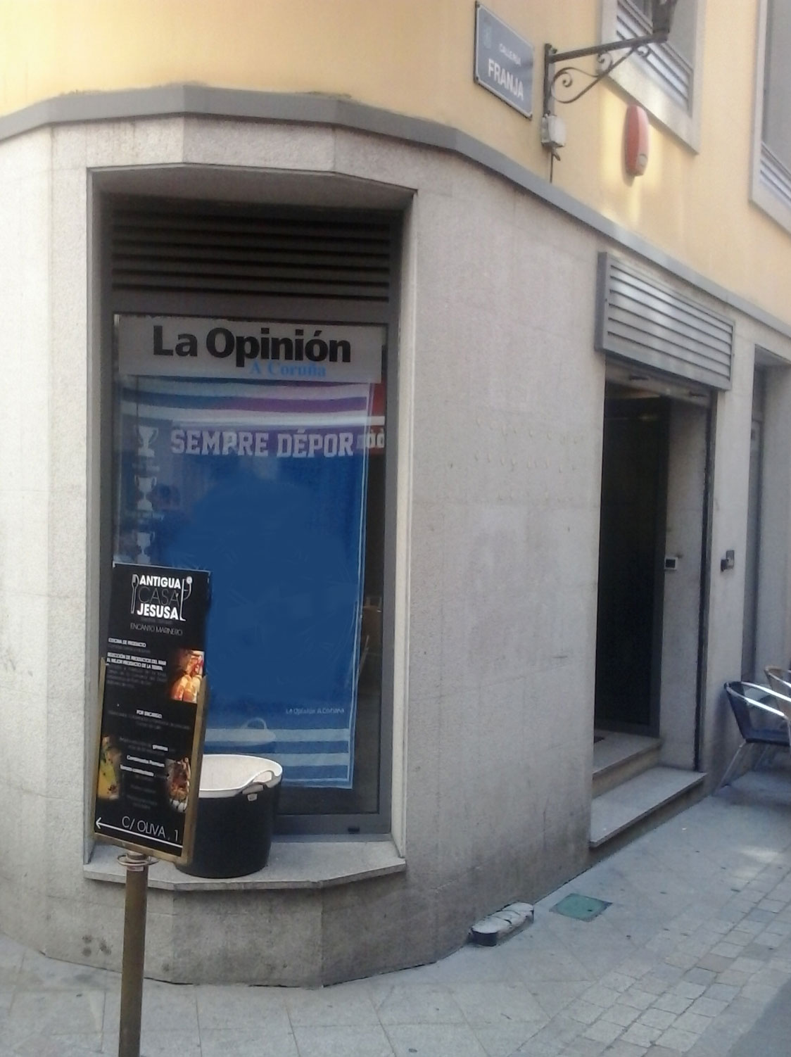 Oficinas de La Opinión na Coruña Galiza